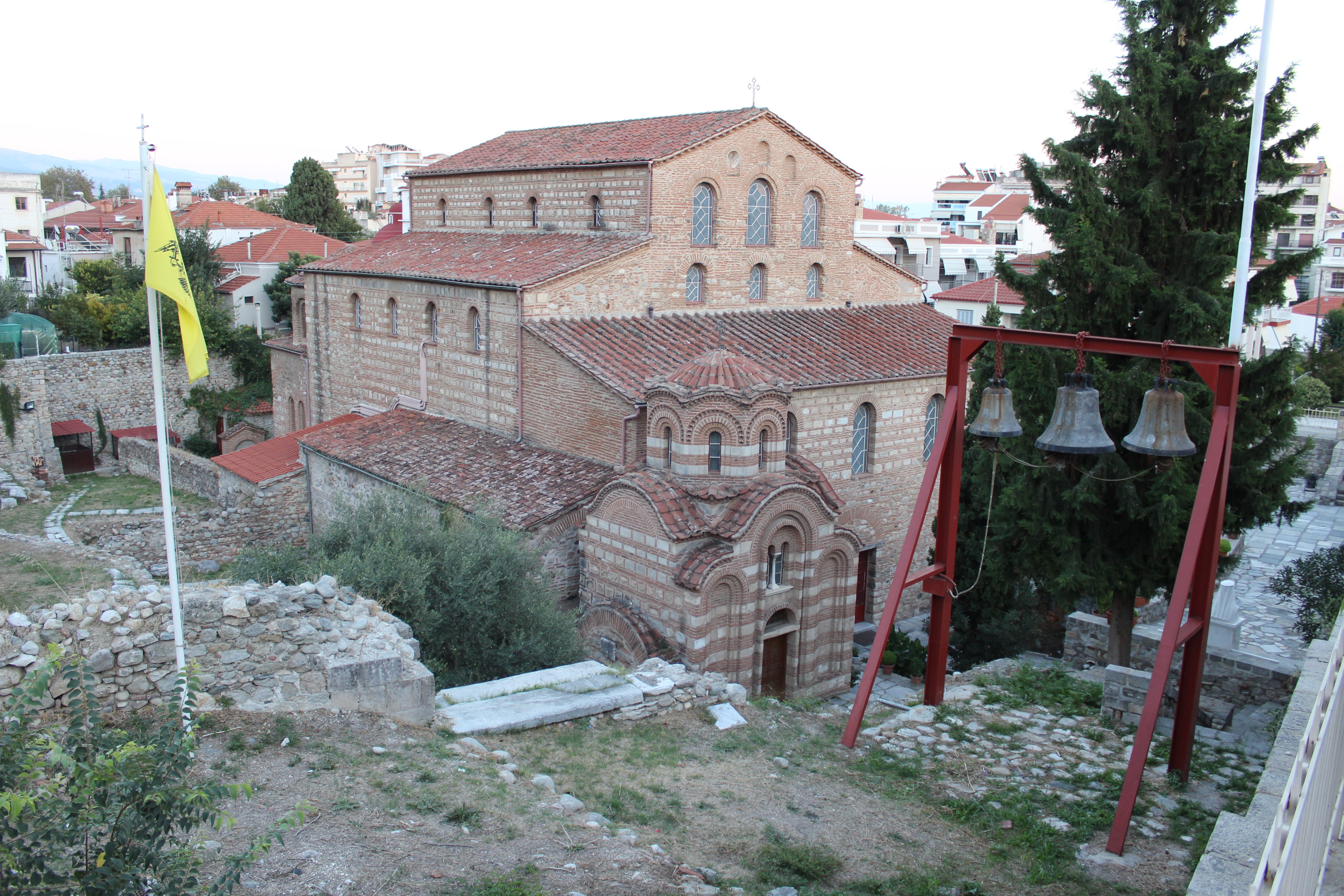 «Ναός Παλαιάς Μητρόπολης Σερρών»